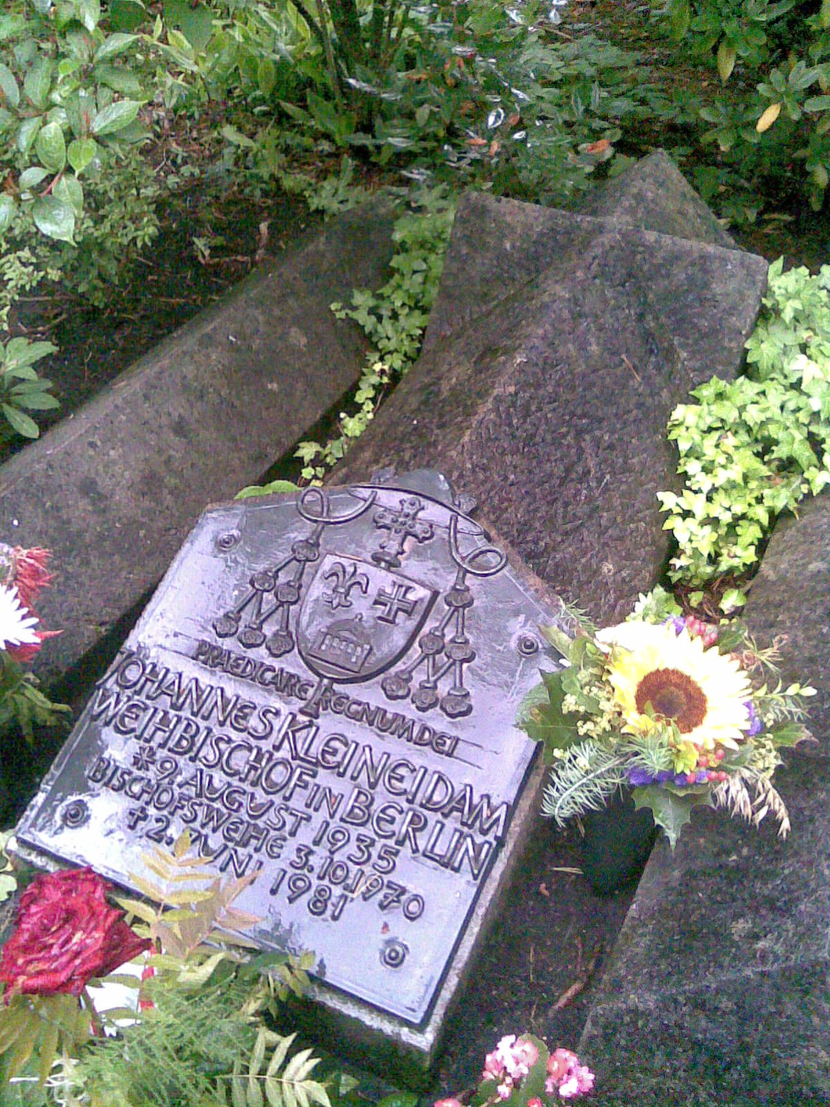 Grabstelle von Johannes Kleineidam in Berlin-Alt-Hohenschönhausen (Konrad-Wolf-Straße)